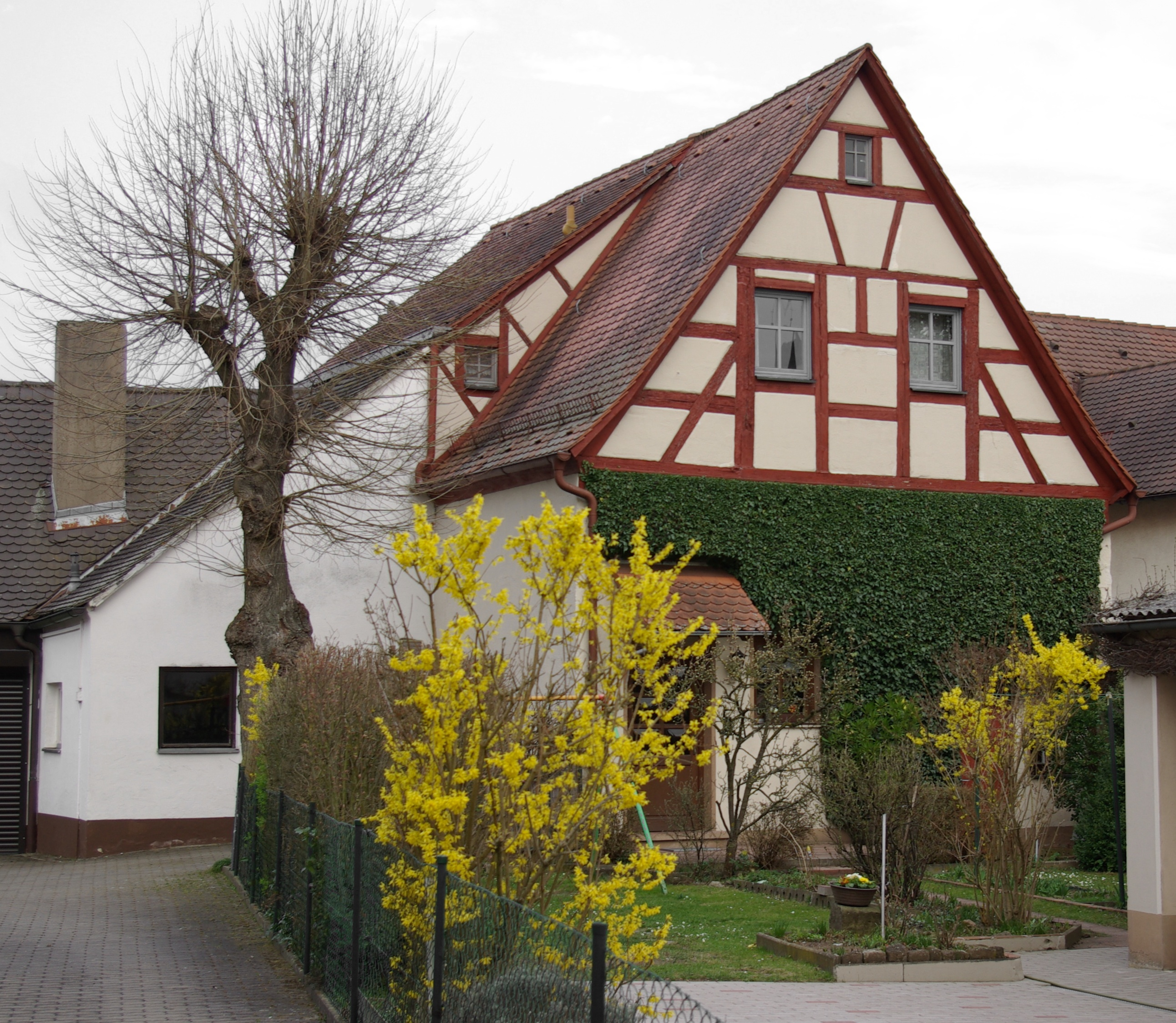 Ehemalige Synagoge, Judengasse 1a (früher Haus Nr. 58) im Erlanger Stadtteil Bruck